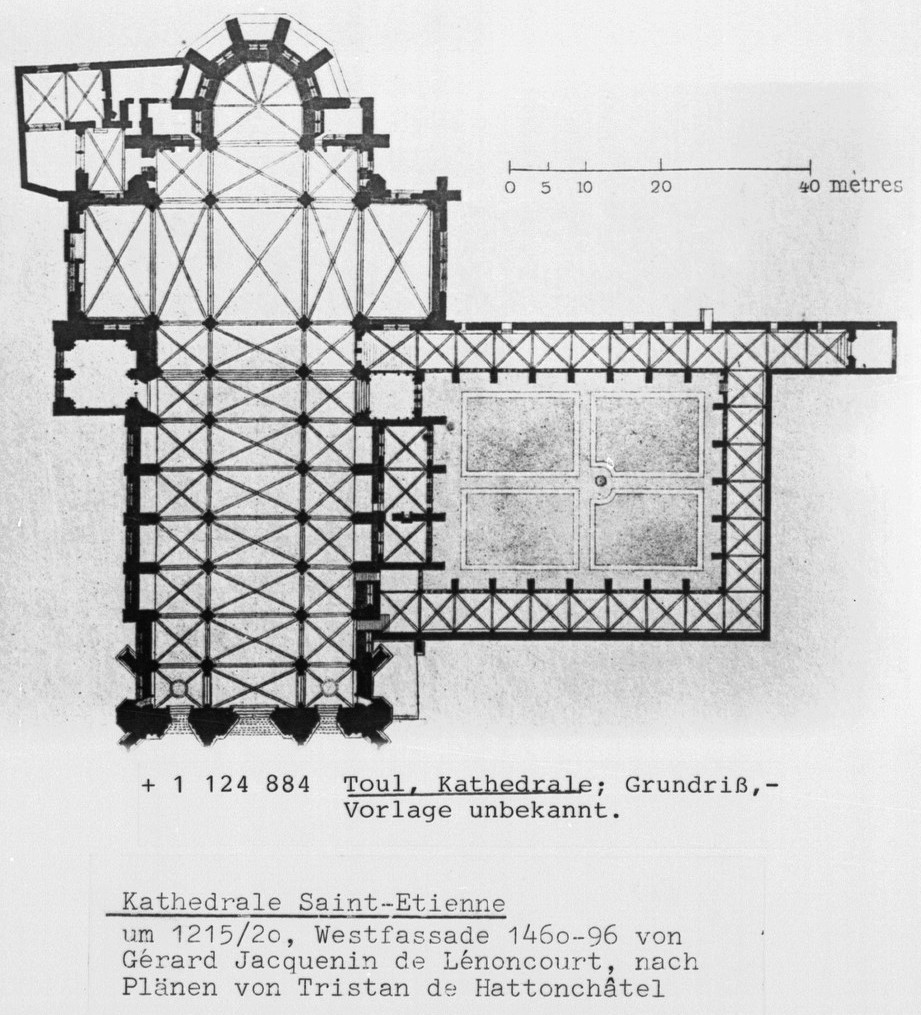 Plan en masse du groupe cathédral de Toul : cathédrale Saint-Étienne, annexes et cloître gothique.